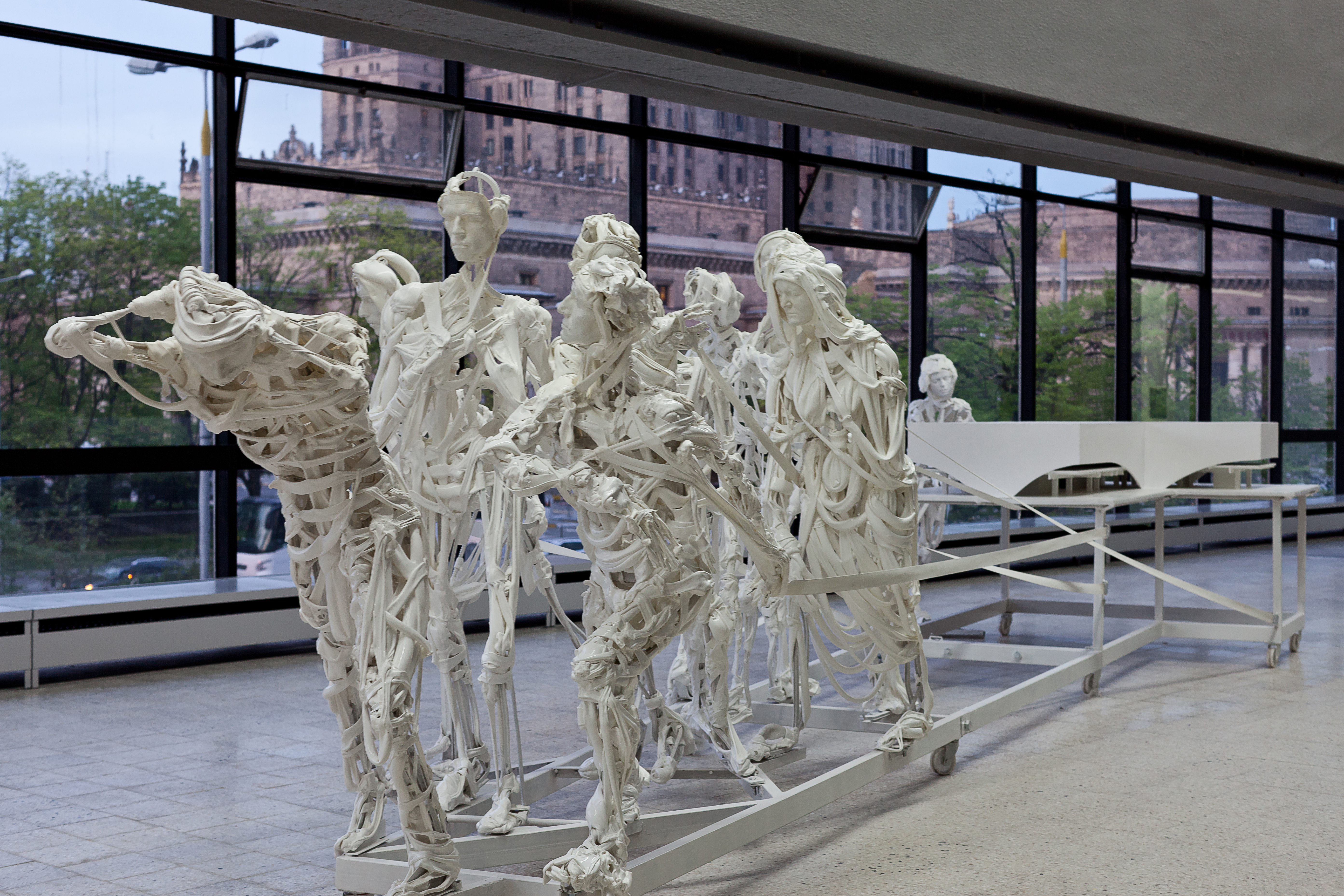 Burłacy to praca zainspirowana sytuacją Muzeum Sztuki Nowoczesnej w Warszawie – instytucji, która nieustannie zabiega o wybudowanie swojego gmachu, a tym samym przypieczętowanie swego istnienia i utrwalenie miejsca kultury współczesnej w społeczeństwie. Althamer posłużył się odwołaniem do bardzo znanego obrazu Burłacy na Wołdze (1873) Ilji Riepina, rosyjskiego malarza, który łączył realizm przedstawienia z sympatią dla ludu. W rzeźbie, wykonanej autorską techniką artysty, znalazły się przedstawienia 11 pierwszych członków zespołu Muzeum (można ich rozpoznać dzięki odlewom twarzy), którzy z wysiłkiem, ale i w zapamiętaniu ciągną – jak burłacy – model Muzeum, które kiedyś ma powstać. Ta grupa rzeźbiarska to wyjątkowy obiekt w kolekcji Muzeum. Nie tylko dokumentuje heroiczny etap istnienia instytucji, jest wyrazem wsparcia dla wysiłków zmierzających do stworzenia w Warszawie muzeum sztuki nowoczesnej, ale i wskazuje na silne przekonanie artysty o społecznej roli sztuki.